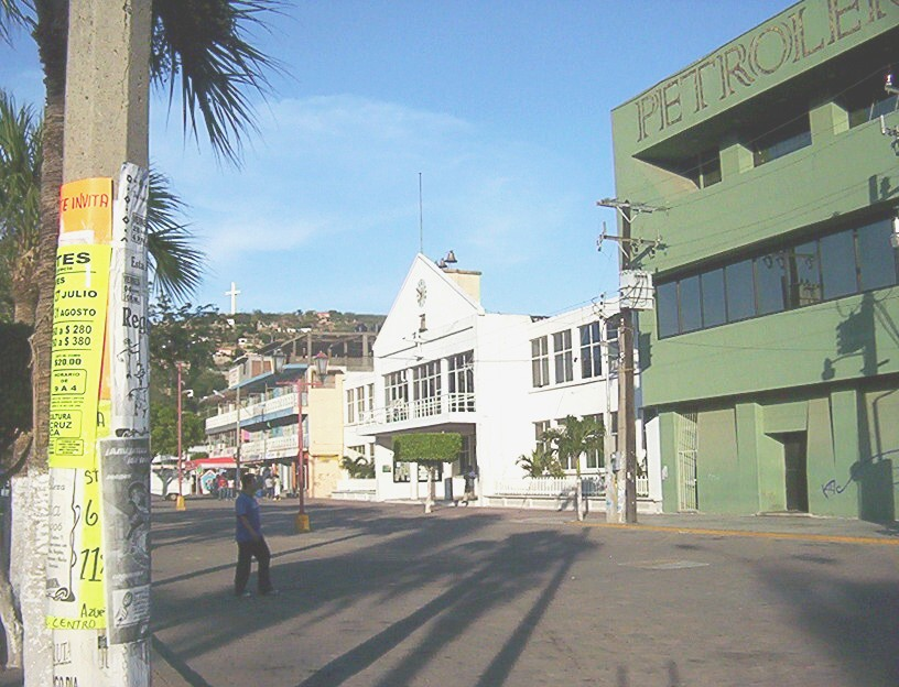 Centro de Salina Cruz, México. Fotografía con cámara digital, agosto de 2006. Autor: Jesús Fernández